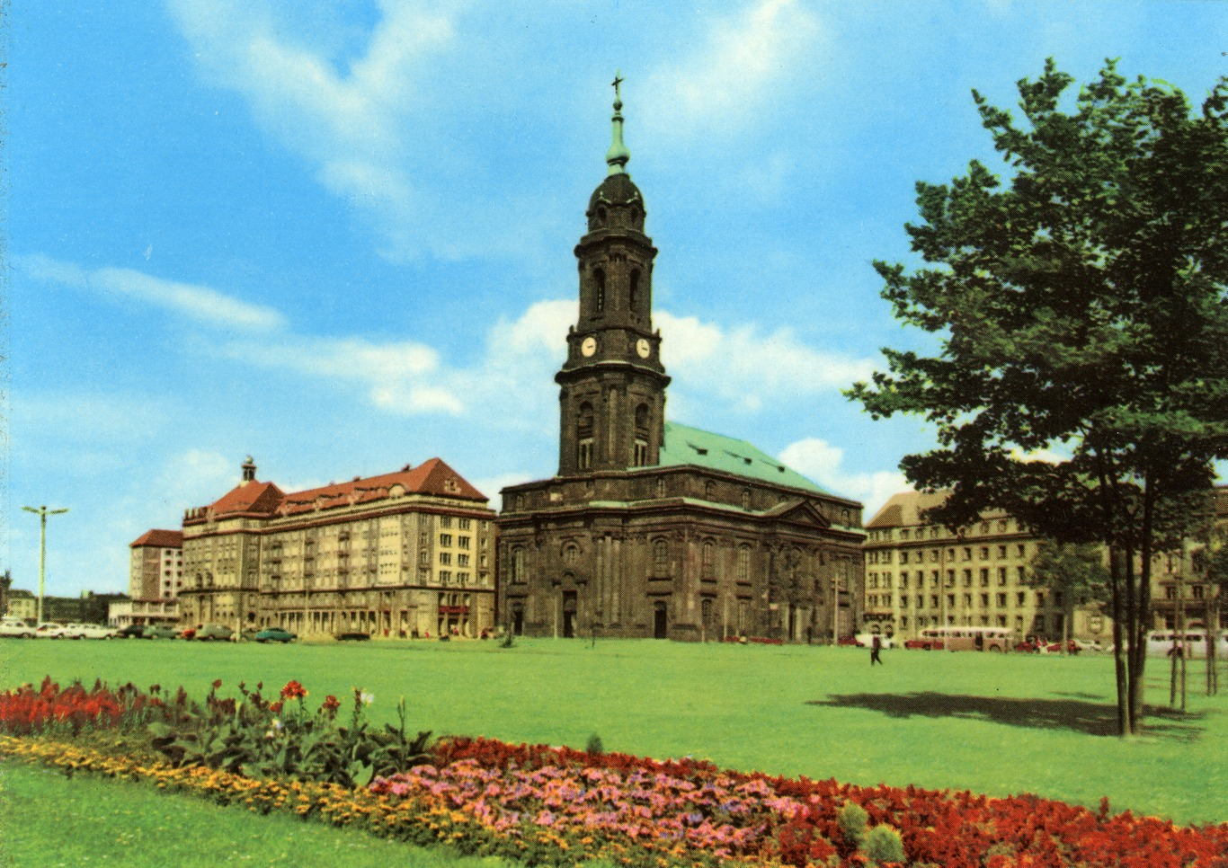 Dresden; Kreuzkirche und rote Blumenrabatte This postcard is from publisher Brück & Sohn in Meißen ( postcard has a unique number 29861 and is available in a higher resolution at the publisher. This images was uploaded in a cooperation project between Wikipedians and the publisher.